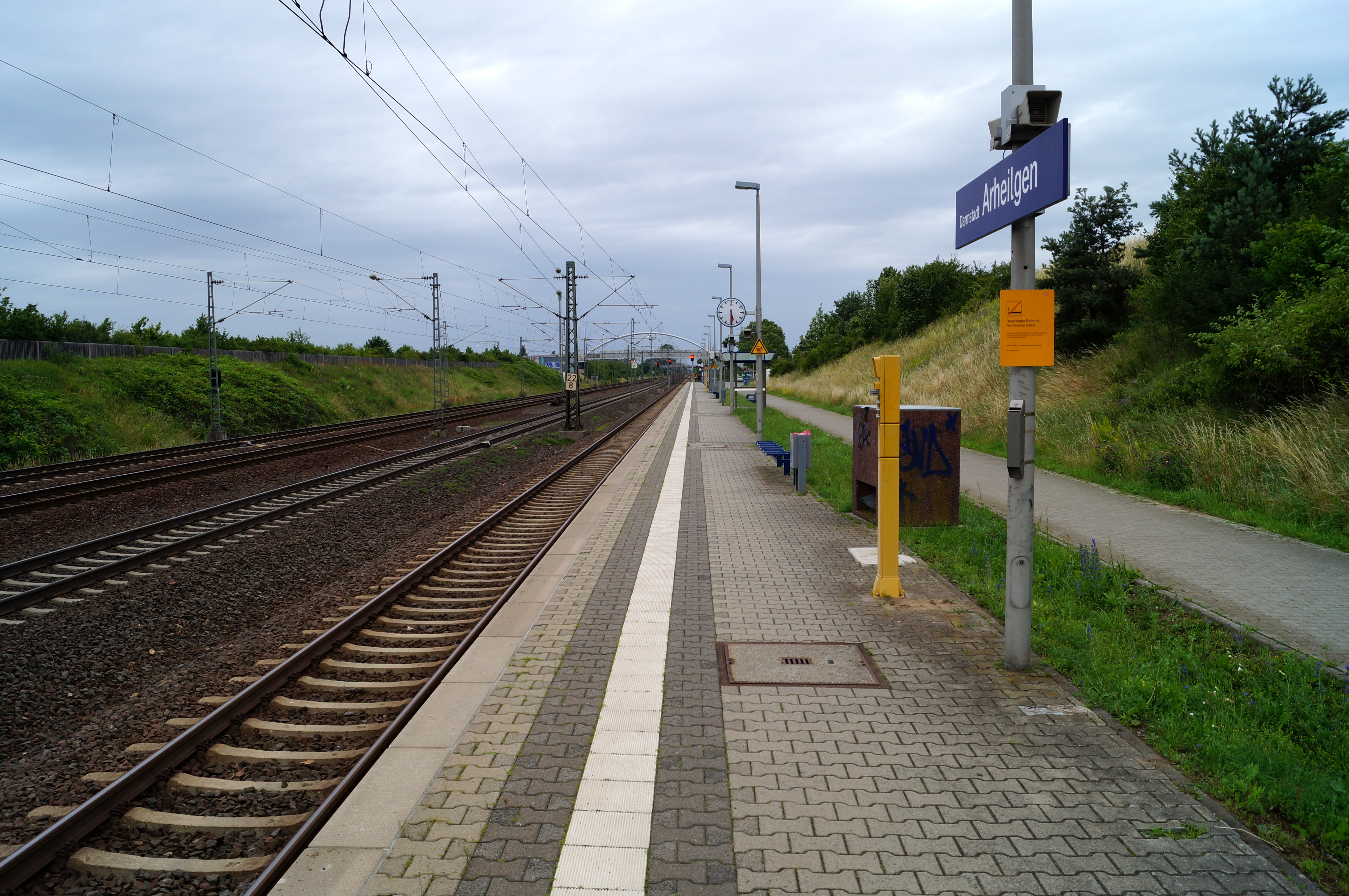 Der Bahnsteig des Darmstadt-Arheilgener Bahnhofs